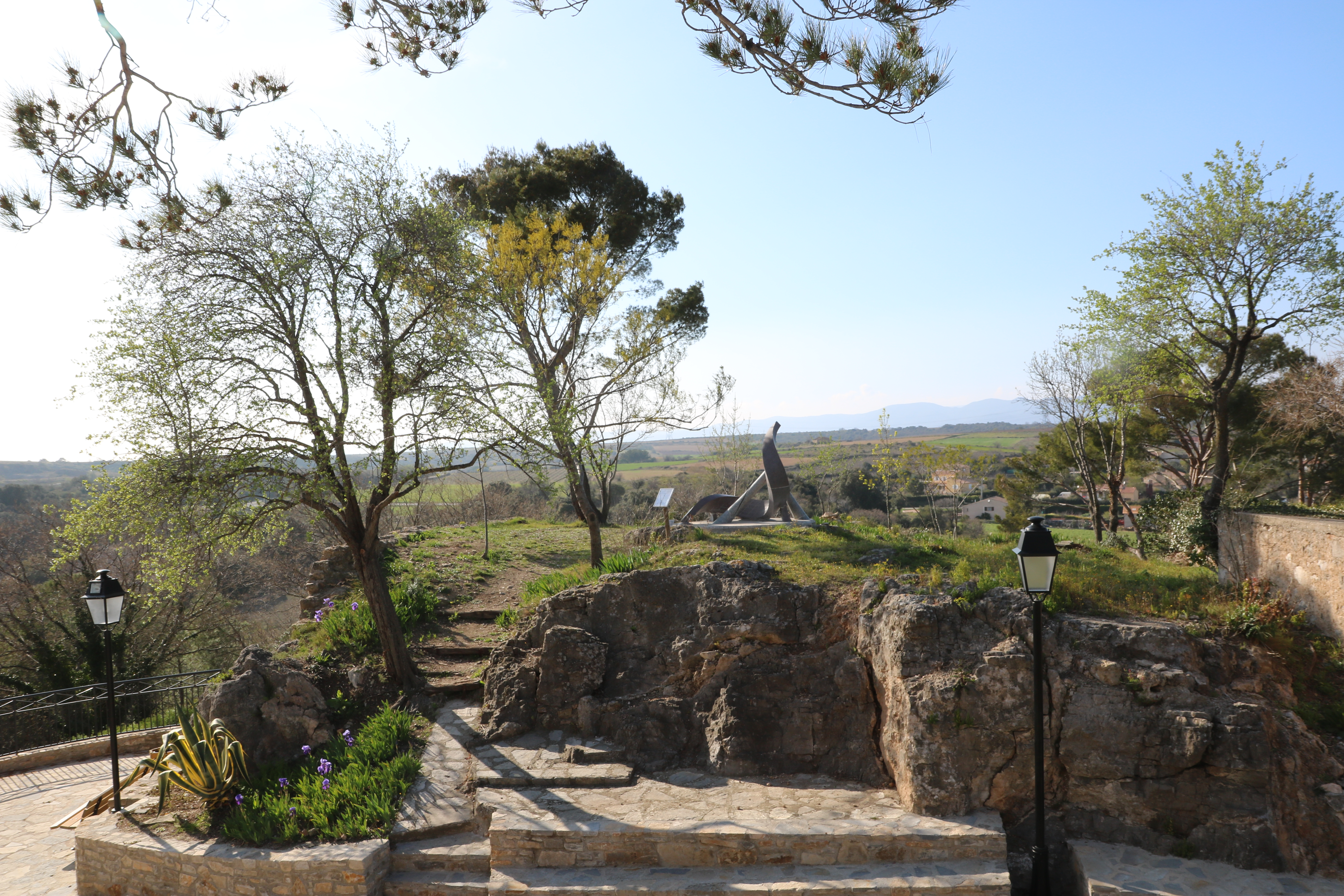 Fouzilhon (Hérault) - cadran solaire - vue générale